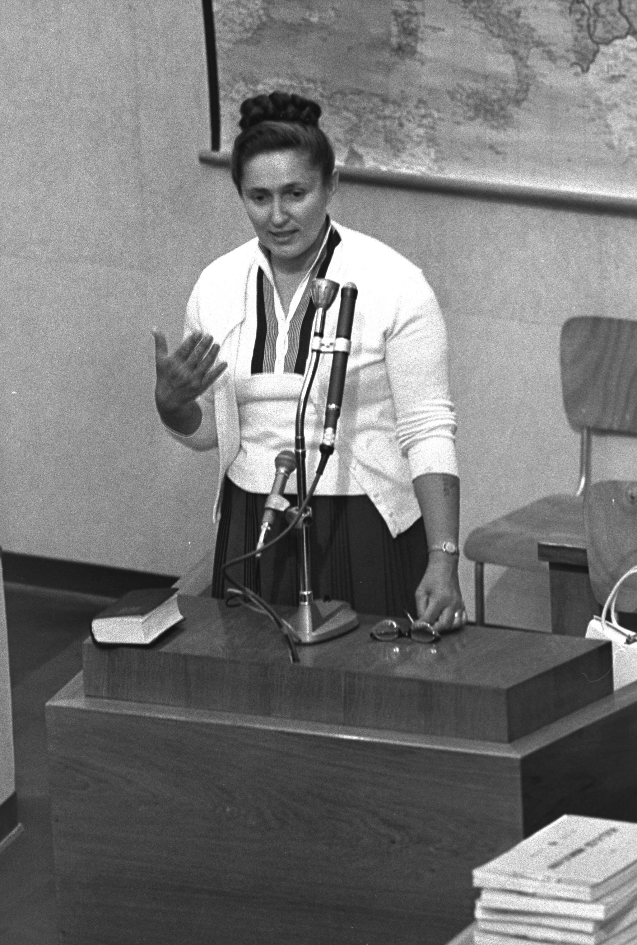 רבקה קופר בעדות במשפט אייכמן, 1961